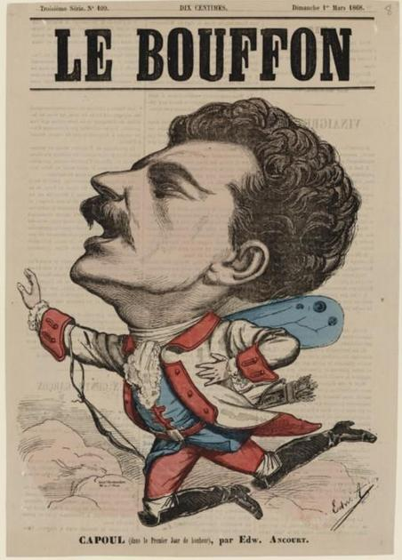 Joseph-Amédée Victor, dit Capoul (1839-1934), dans Le premier jour de bonheur, d'Auber / Edward Ancourt, graveur, gravure sur bois 26 x 22 cm - in Le Bouffon, n° 109 du 1er mars 1868 [cover]